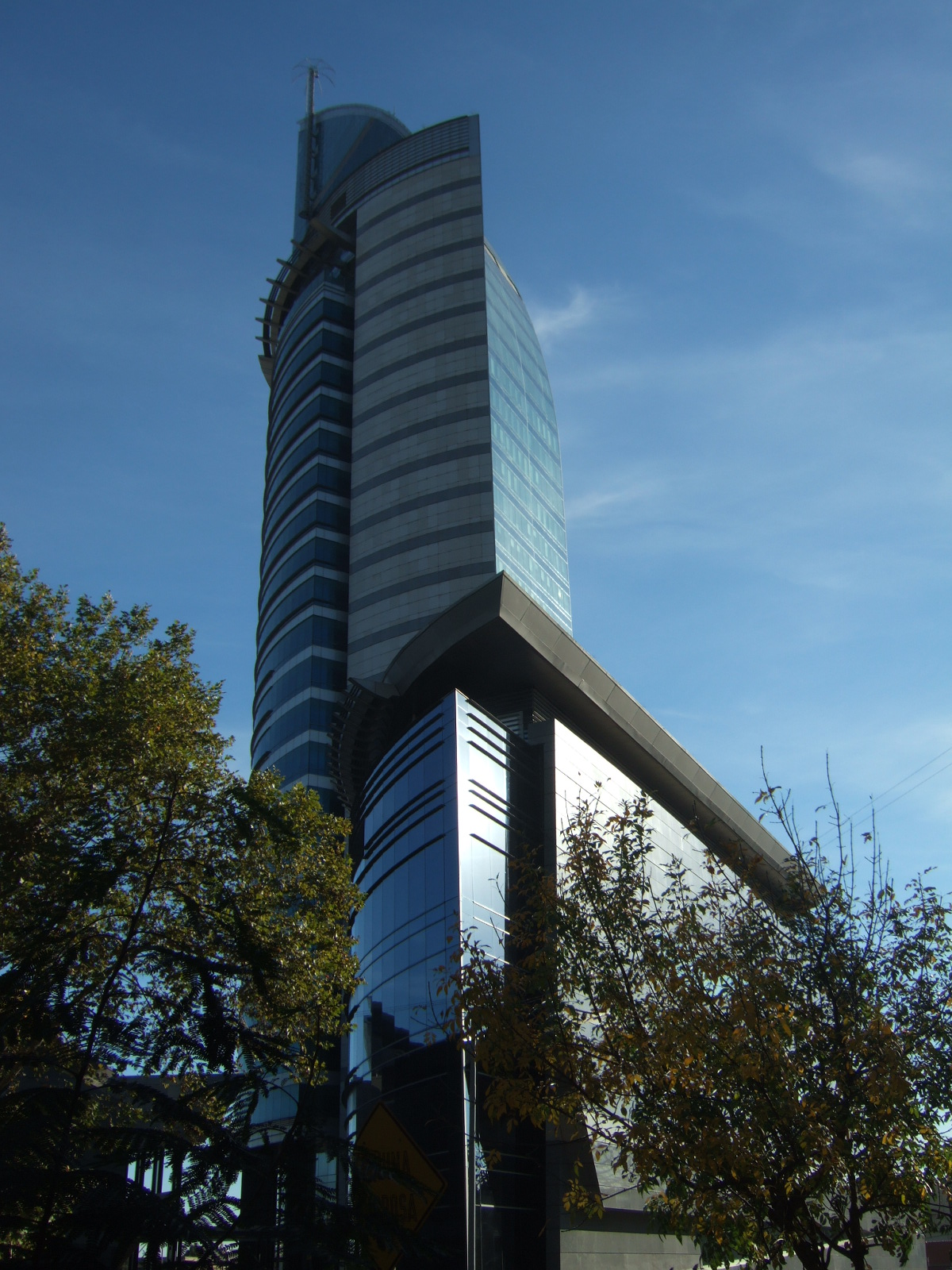 Torre de las Telecomunicaciones (Antel) de Montevideo, Uruguay.